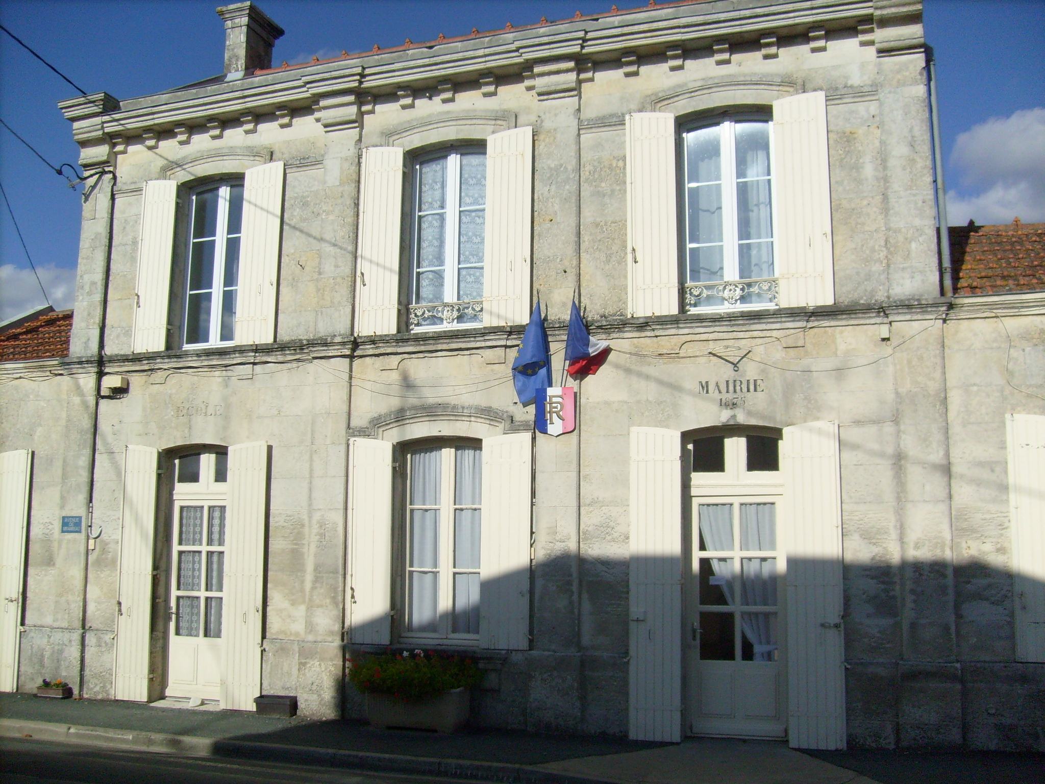 Mairie de Brie sous Mortagne